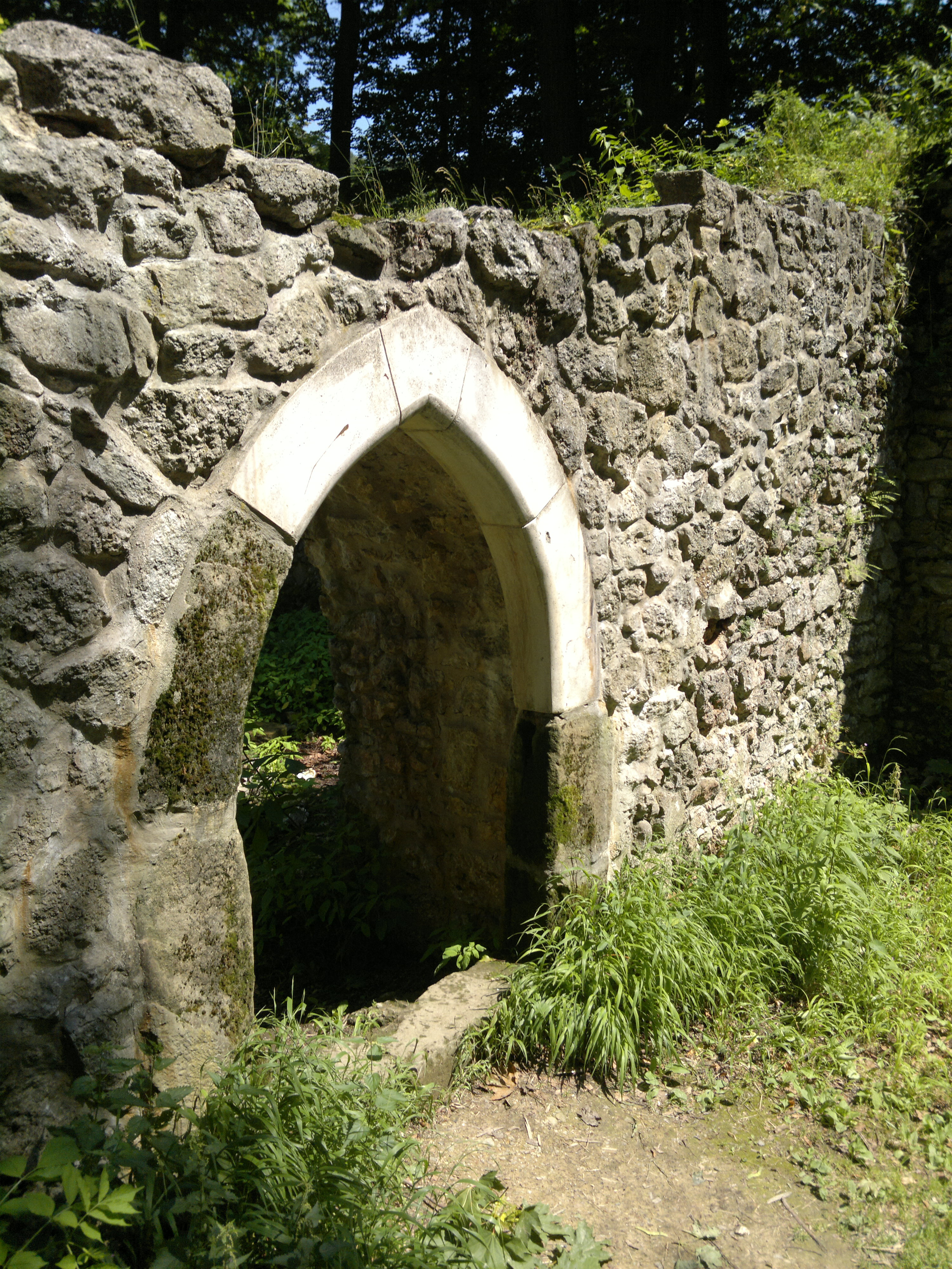 Zřícenina hradu Šostýna; Kopřivnice (CZ)